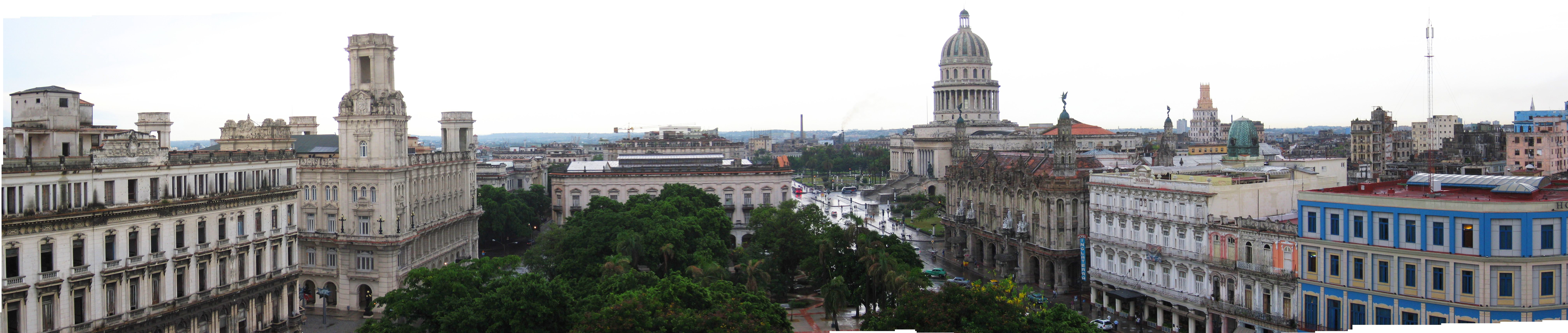 Parque Central